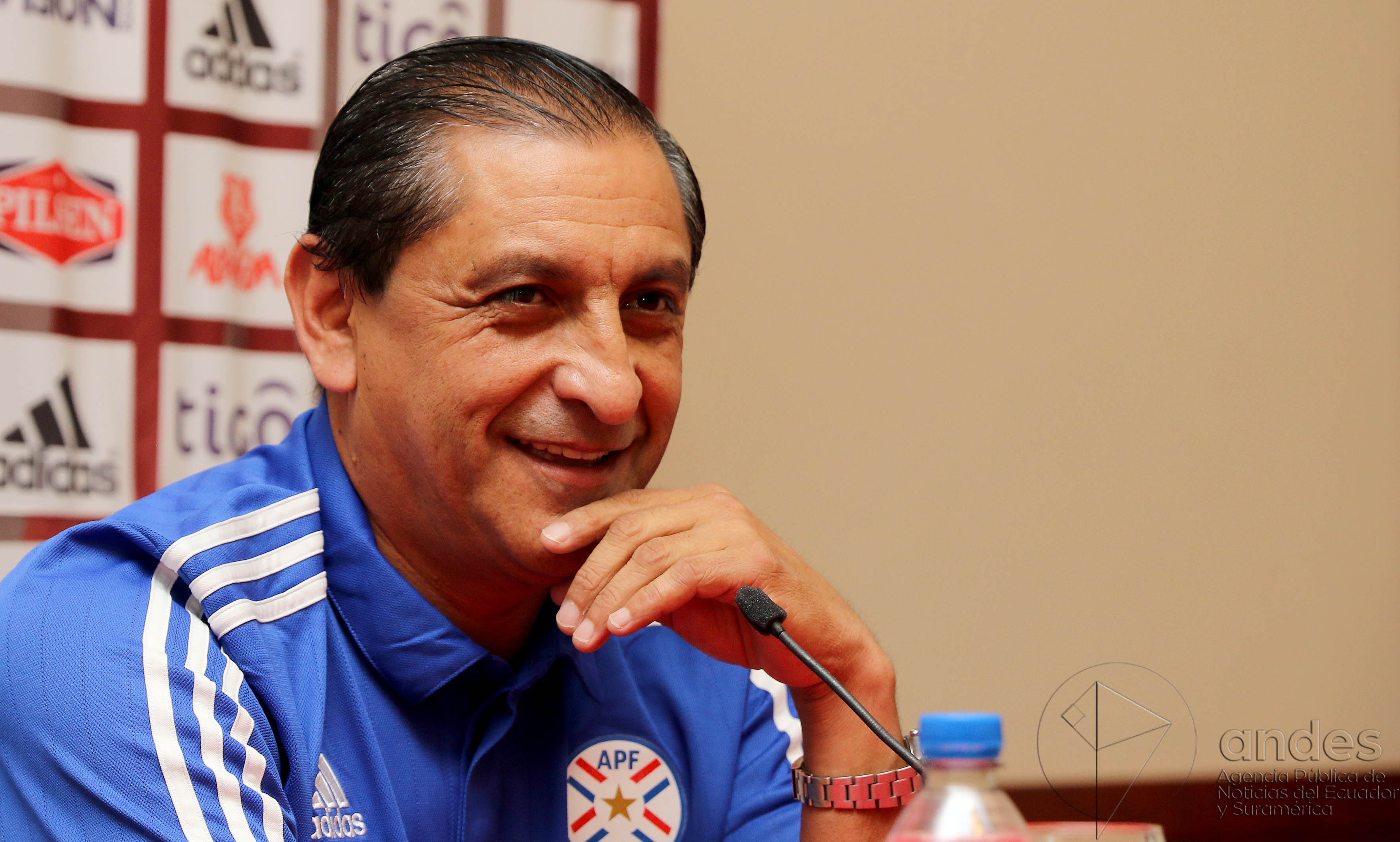 Guayaquil 23 de marzo del 2016 (Andes).-Ramón Díaz, director técnico de la selección paraguaya de fútbol, durante la rueda de prensa que ofrecio en Guayaquil. Foto:Andes/César Muñoz